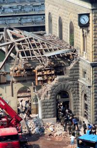 Strage di Bologna, 2 agosto 1980.